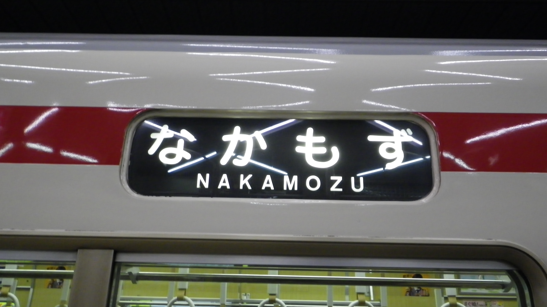 北大阪急行電鉄8000形電車の行き先表示機の「なかもず」表示。